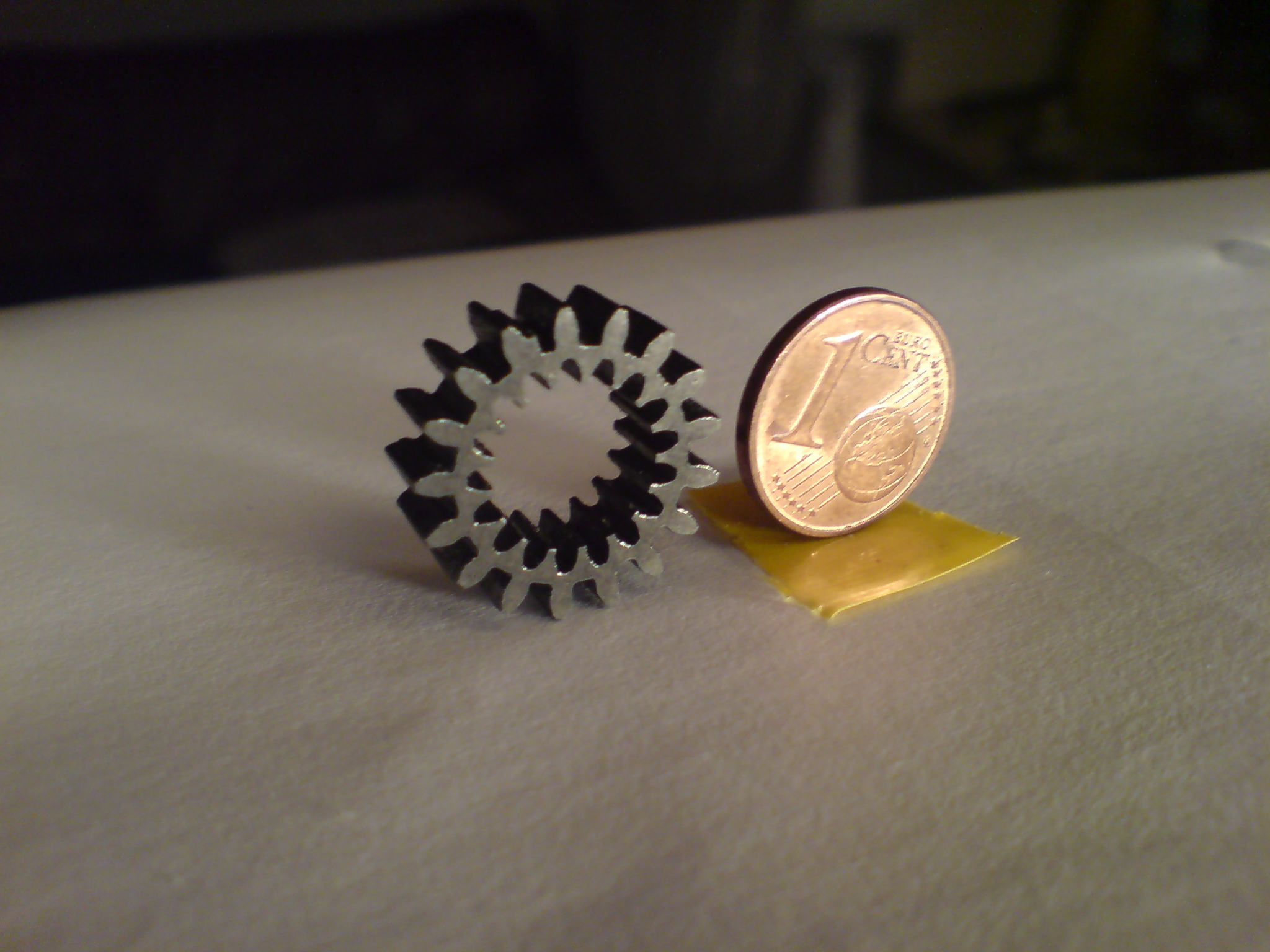 Zahnradritzel im Pulsverfahren lasergeschnitten, Baustahl mit 6 mm Stärke